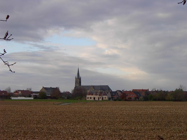 Dikkebus 14-11-2007